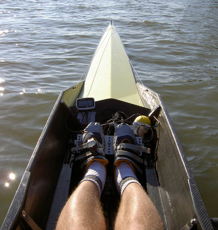 Das Bild Zeig den Ruderplatz des Schlagmanns eines Zweier ohne aus dessen Sicht. Man erkennt den beweglichen rechten Schuh und die daran befestigten Bowdenzüge. Diese "Steuerseile" spannen sich über das Heck des Bootes und enden am Steuerbalken (In der gezeigen Ausführung kann die Übersetzung und damit die Empfindlichkeit des Steuers eingestellt werden). Das Kreuzen der Steuerseile ist deshalb notwendig um den Richtungsinn zu bewahren. Da Ruderer gegen die Fahrtrichtung blicken führt so eine Drehung der Fußes nach rechts auch zu einer Rechtskurve (aus Ruderessicht), die Fußspitze zeigt also in die eingeschlagene Richtung.